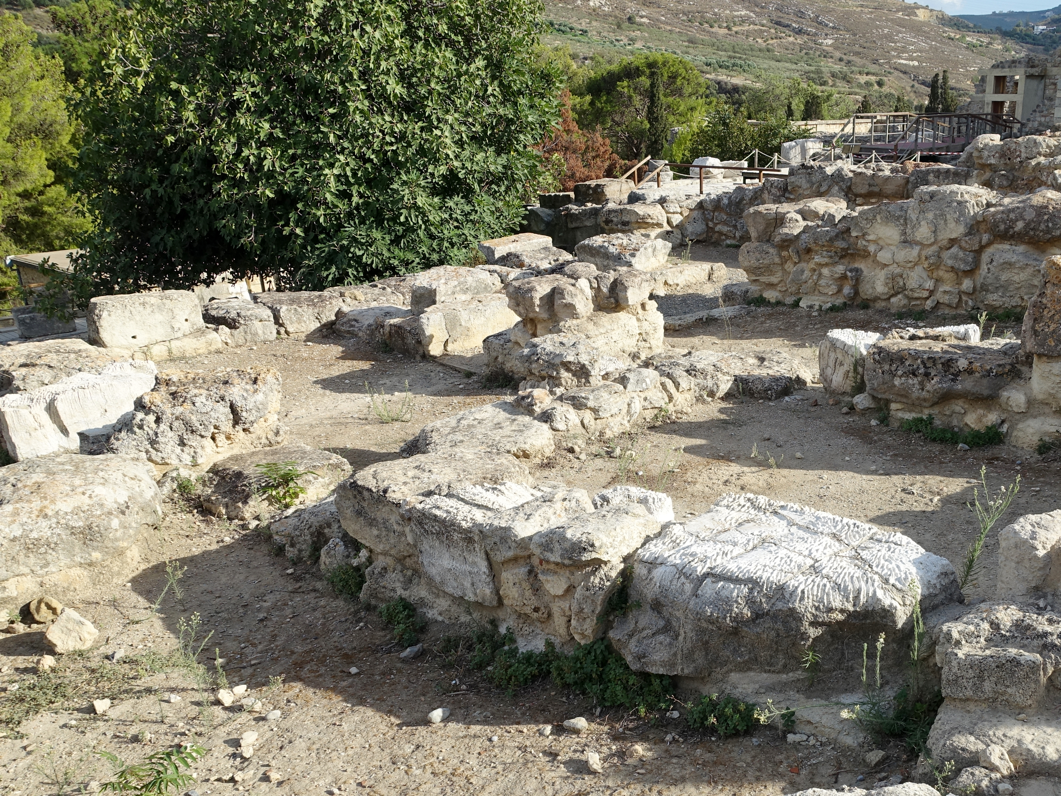 Magazine nordöstlich des Zentralhofes von Knossos (Κνωσός), Kreta, Griechenland